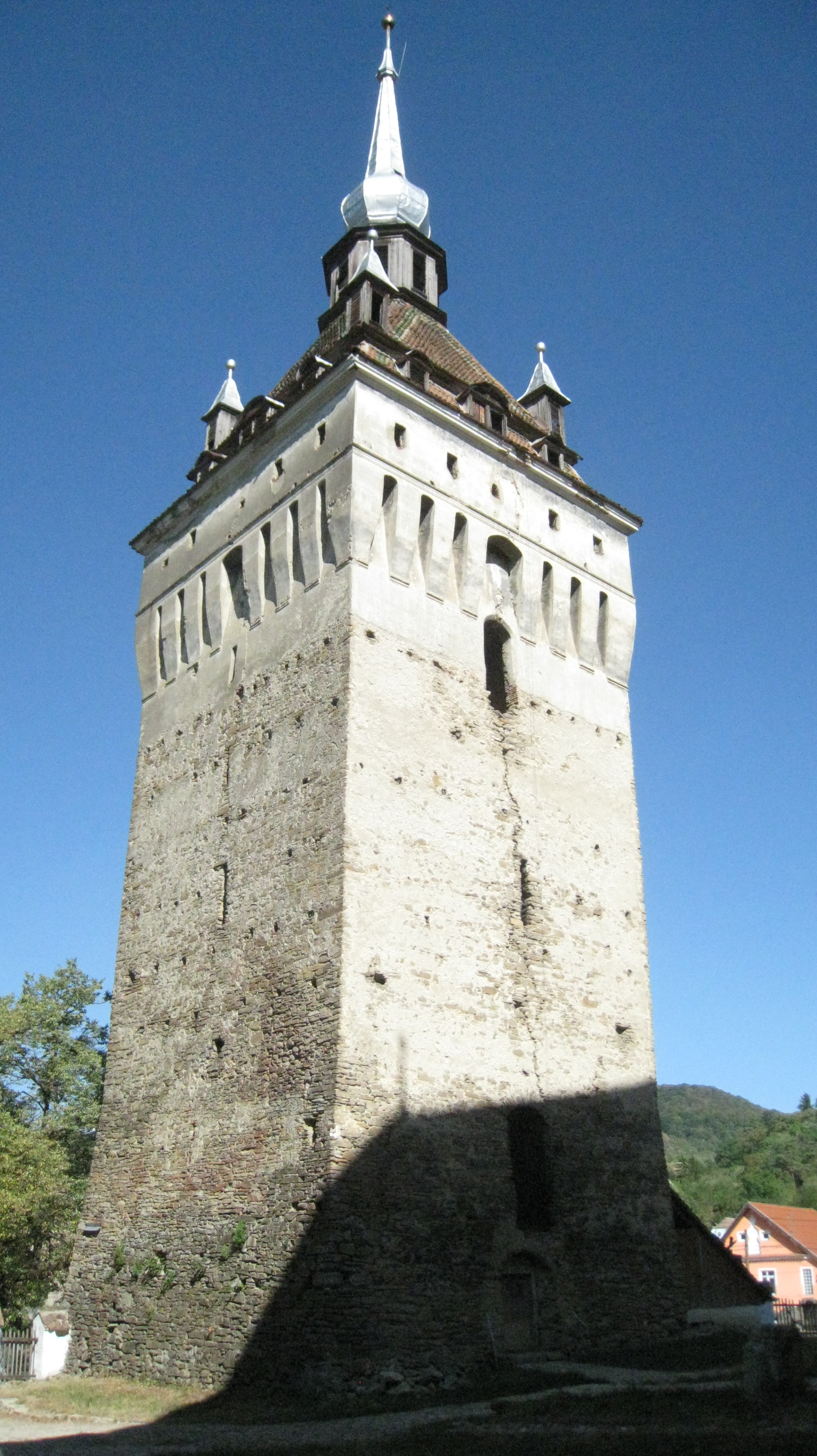 Inalt si solemn, predomina intregul ansamblu arhitectural 02